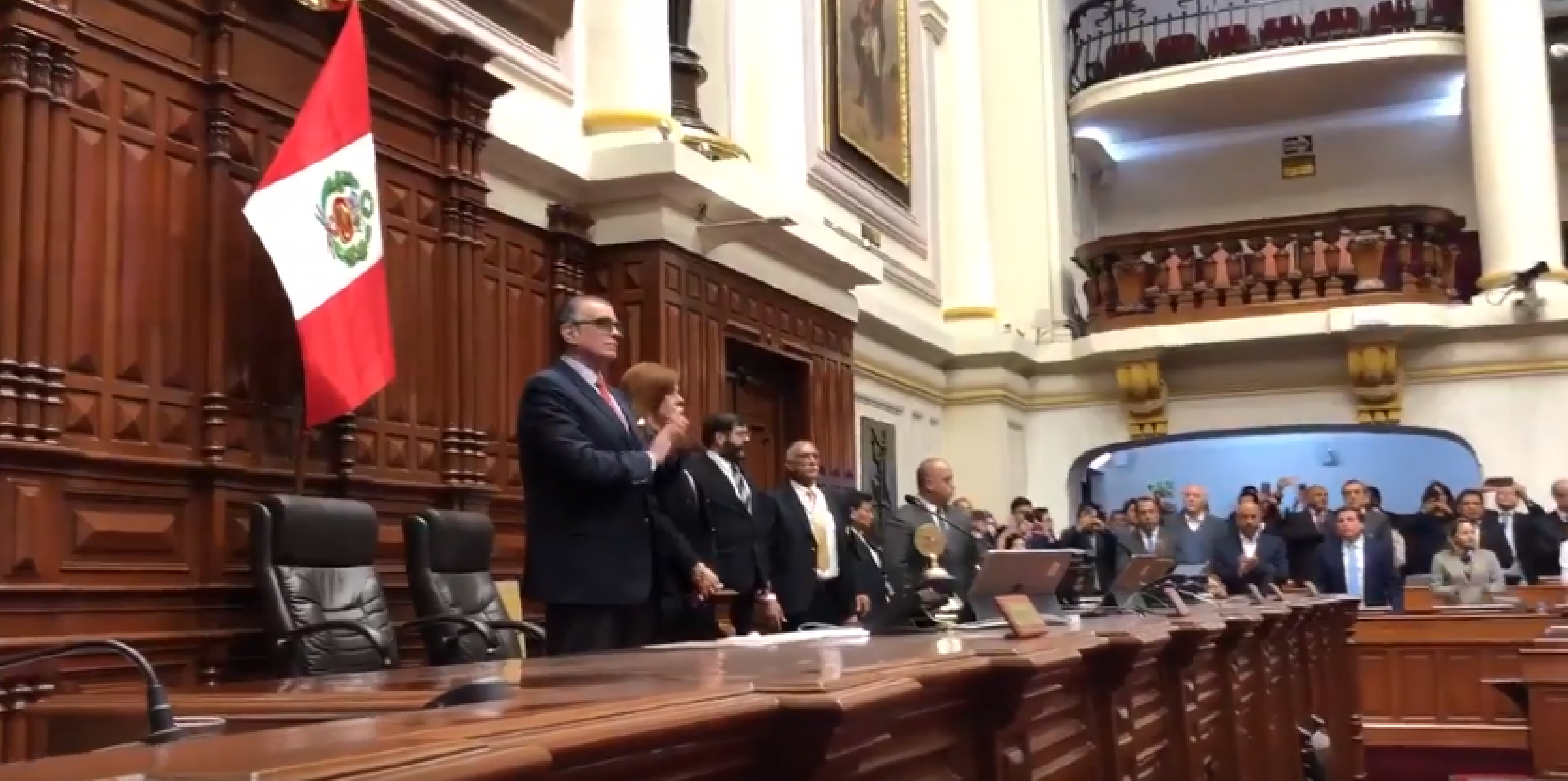 La segunda vicepresidenta Mercedes Aráoz asume la presidencia interina del Perú en reemplazo de Martín Vizcarra